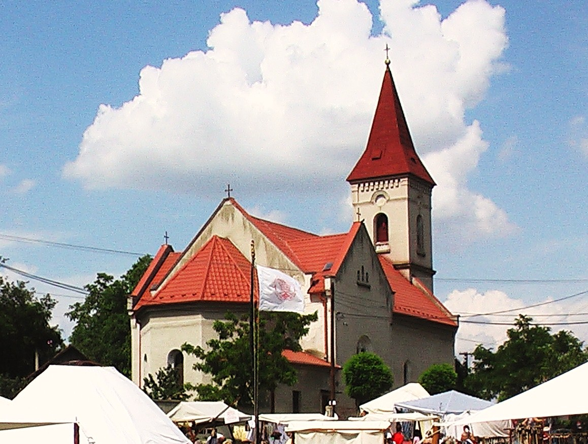 Dolné Saliby - rímskokatolícky kostol